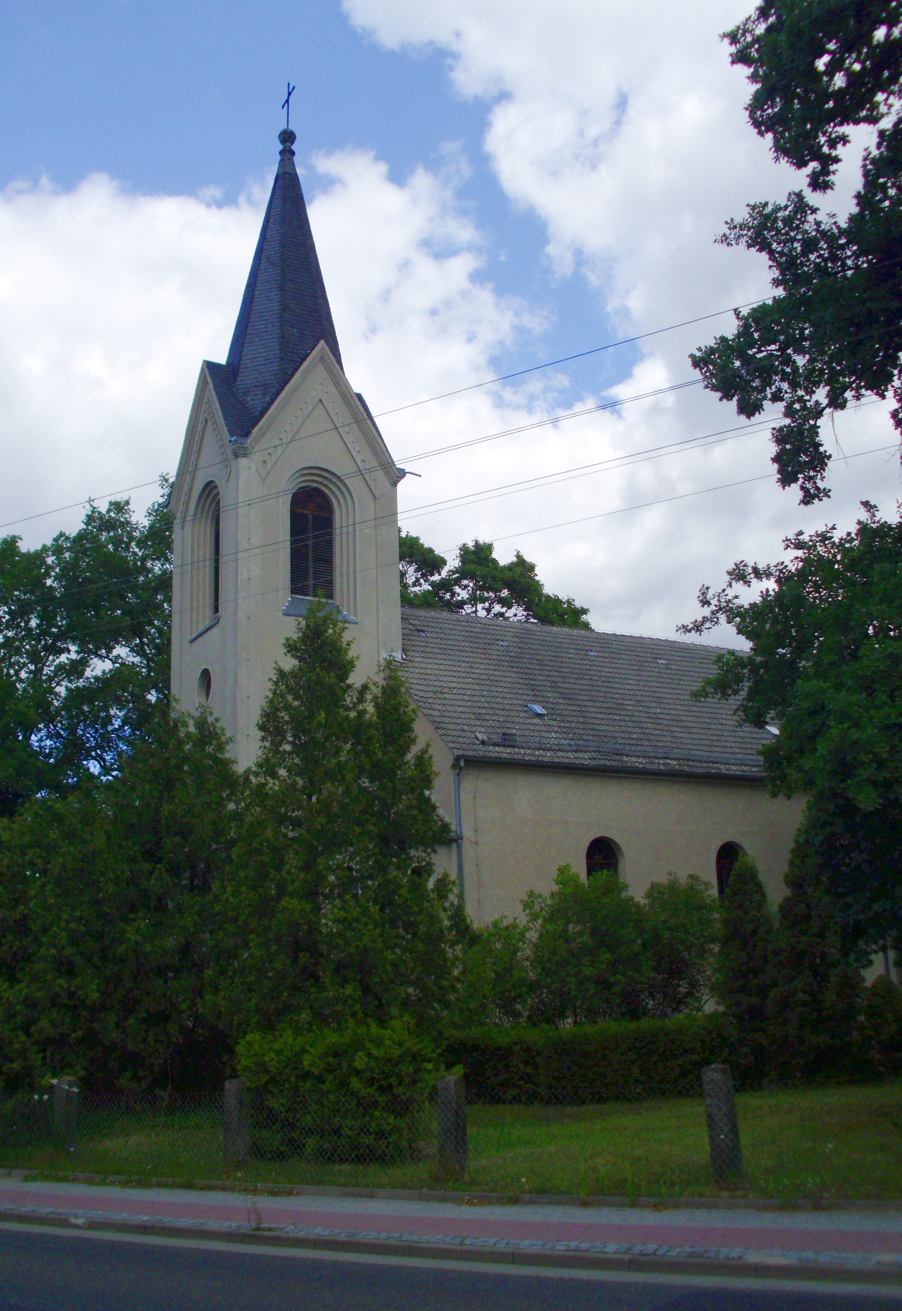 Kirche von Groß Breesen, Guben, Brandenburg, Deutschland